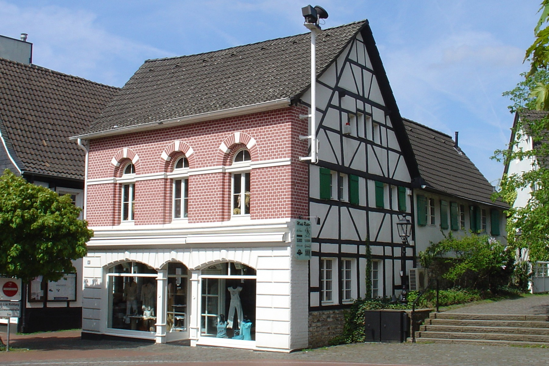 In der Kleinen Hacke, Hilden, Mittelstraße 68 This is a photograph of an architectural monument.